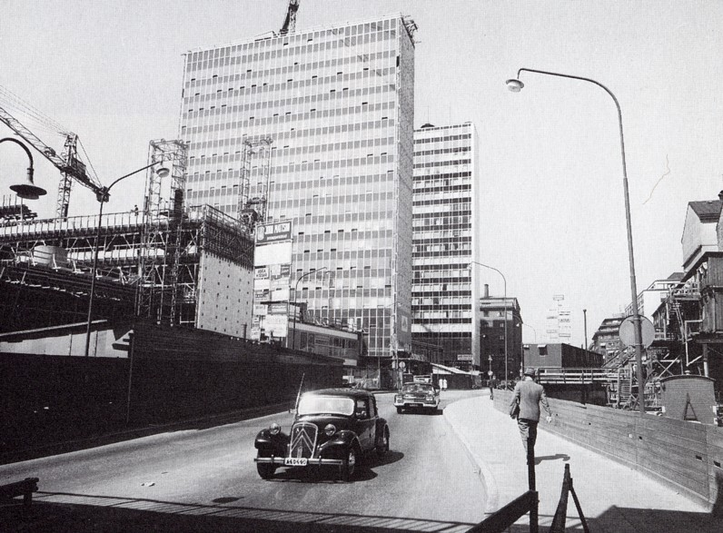 Hötorgscity i Stockholm 1959